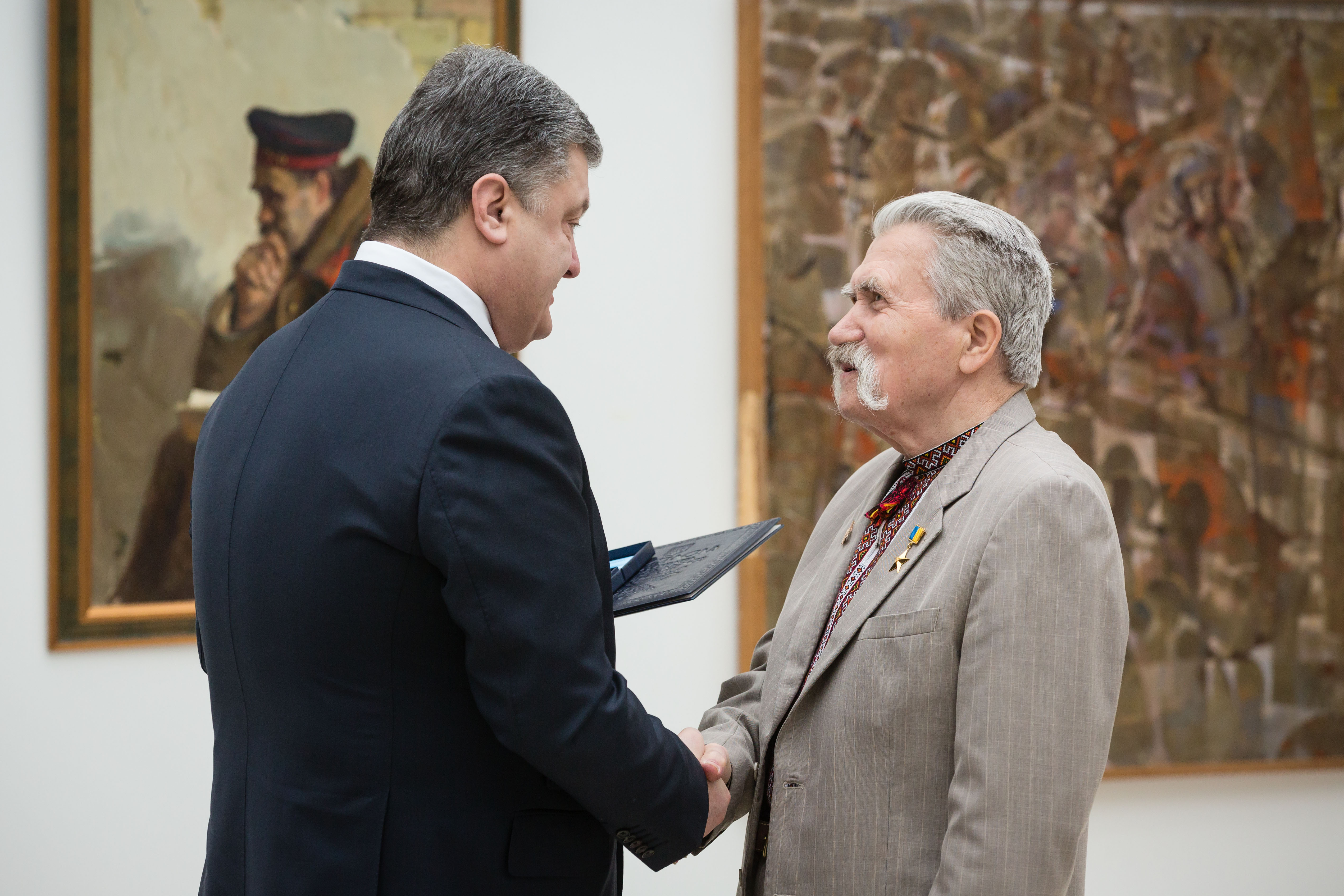 Левко Лук'яненко на церемонії вручення Національної премії України імені Тараса Шевченка 2016 року.